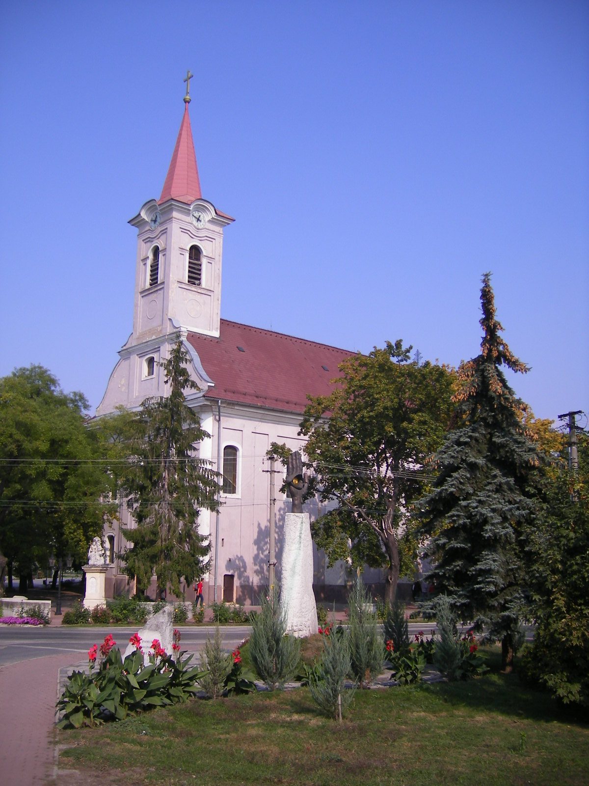 Udvard - katolikus templom és a kitelepítettek emlékműve